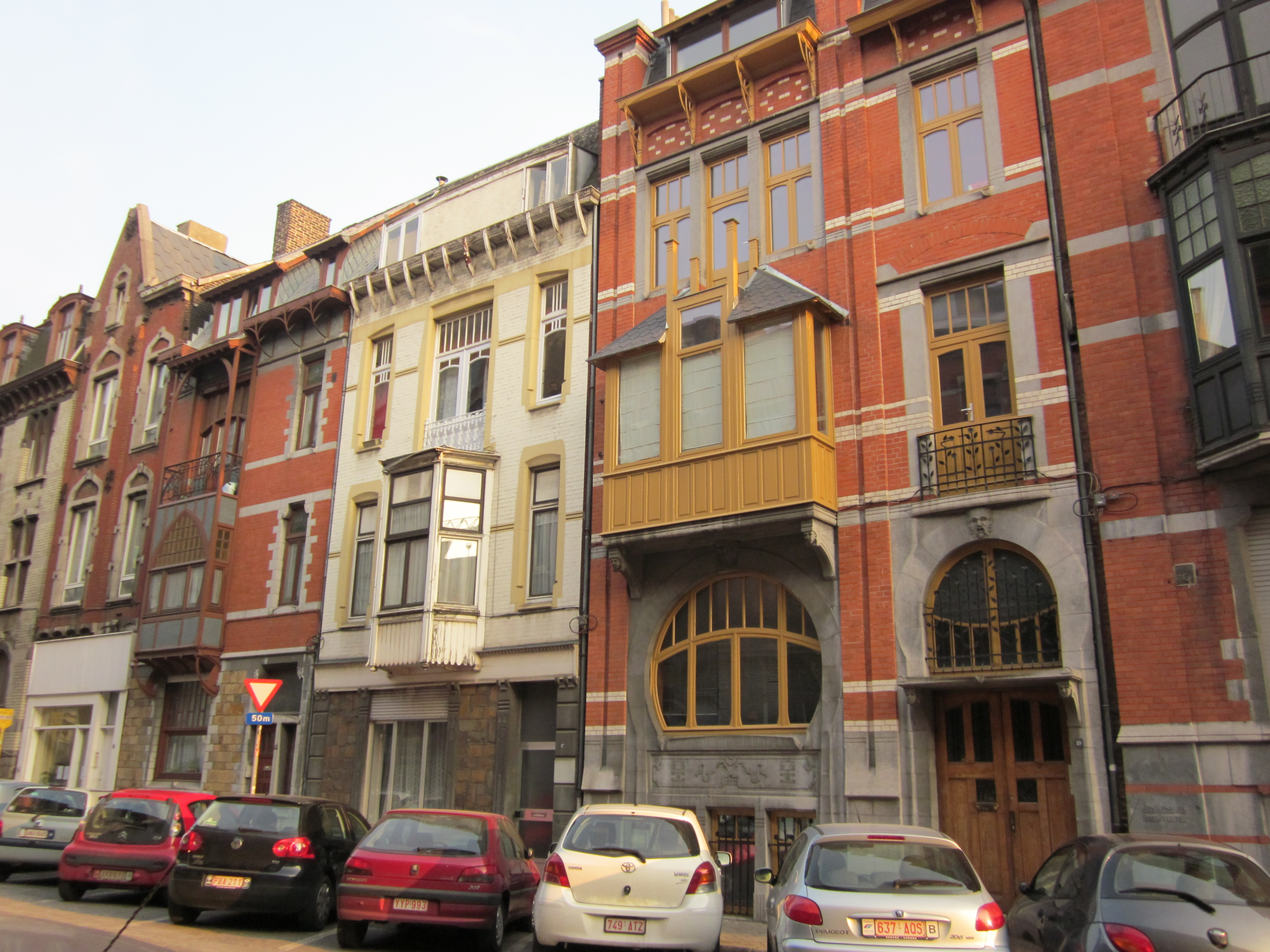 sequ.nusbaum